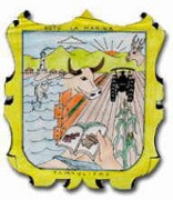 Escudo de Armas de Soto La Marina Tamaulipas